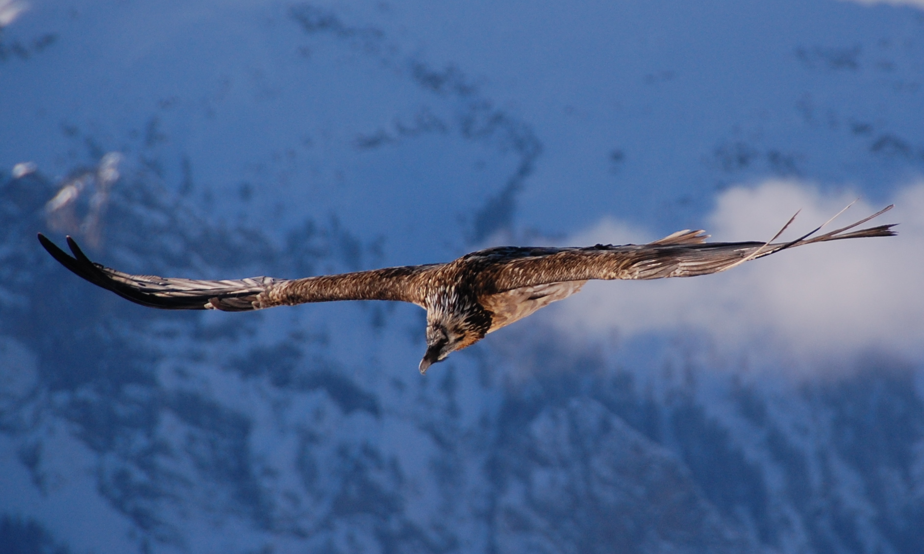 Lammergeier Gypaetus barbatus, immature; Mürren, Berne, Switzerland (reintroduced population).